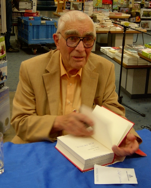 Der Theaterwissenschaftler und -kritiker Ernst Schumacher nach einer Buchlesung in Berlin-Köpenick, September 2006.